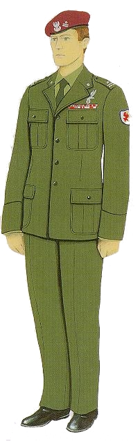 mundur wyjściowy majora Wojska Polskiego